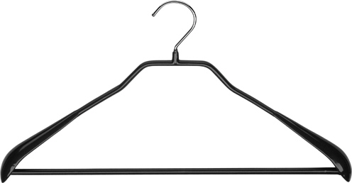 MAWA Bodyform 42 LS - körpergeformter Metallbügel mit Schulterverbreiterung (auch Löffel genannt), Hosensteg und der von Martin Wagner (MAWA Gründer) entwickelten und patentierten Anti-Rutsch-Beschichtung